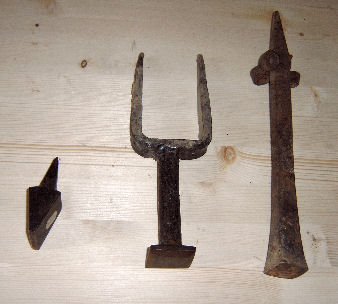 Gemaakt door gebruiker Arakrys. Ik doe hierbij afstand van alle rechten.